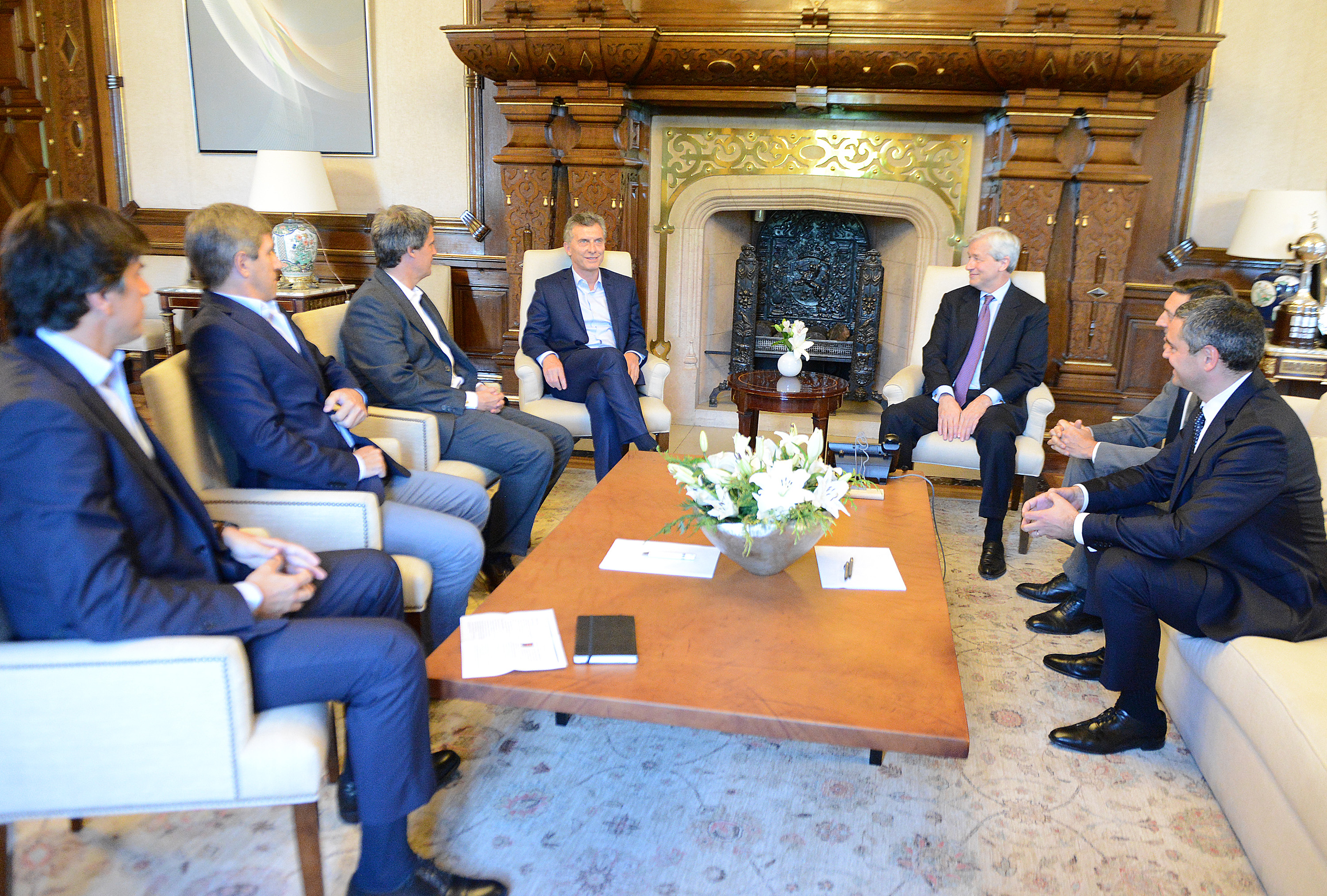 El presidente Mauricio Macri recibió en Casa de Gobierno al CEO de JP Morgan Chase, Jaime Dimon, quien le anunció el objetivo del banco estadounidense de incrementar su presencia en la Argentina. Acompañaron al Jefe de Estado, el ministro de Hacienda y Finanzas, Alfonso Prat Gay; el secretario de Finanzas, Luis Caputo, y el asesor en Inversiones Extranjeras, Horacio Reyser. También concurrieron al encuentro el CEO de LatAm y Canadá, Martín Marrón, y el CEO de Argentina, Facundo Gómez Minujín.